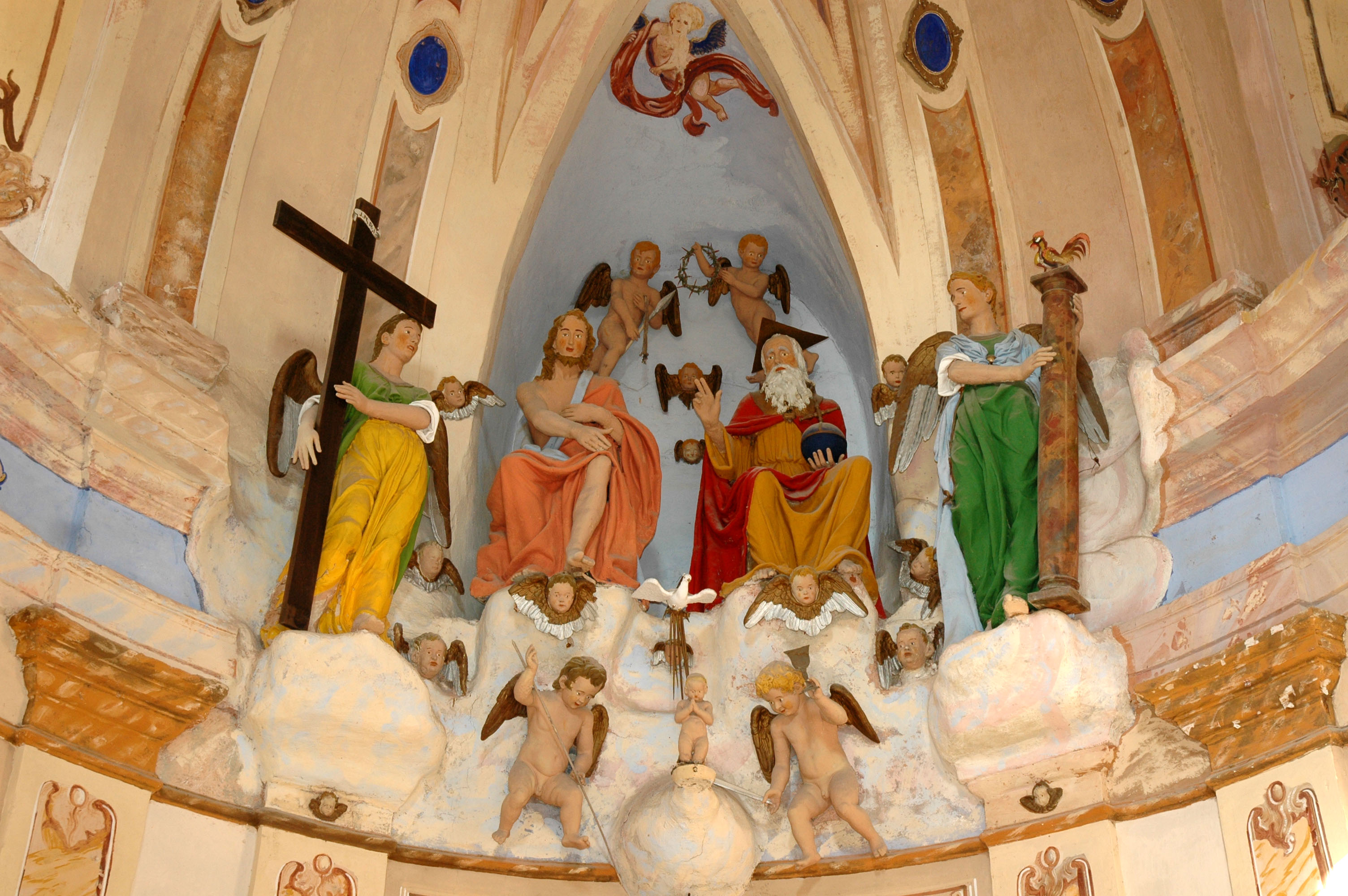 Sacro Monte di Oropa. Figure